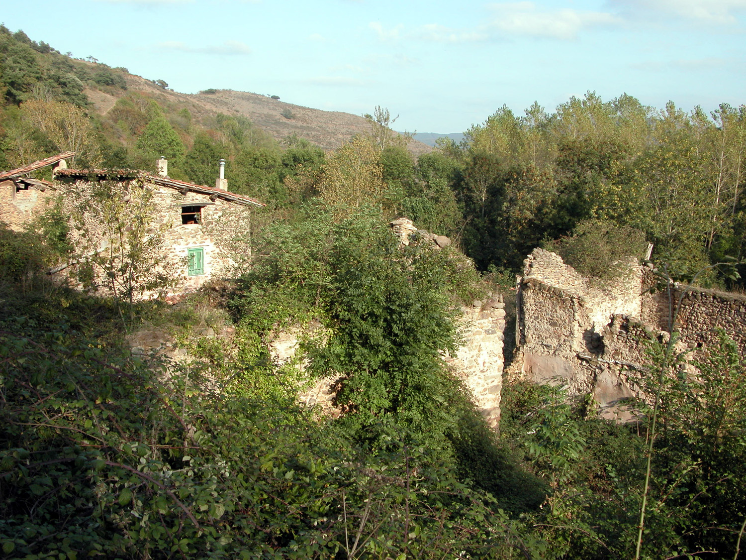 Amunartia, aldea de Ojacastro en La Rioja (España)